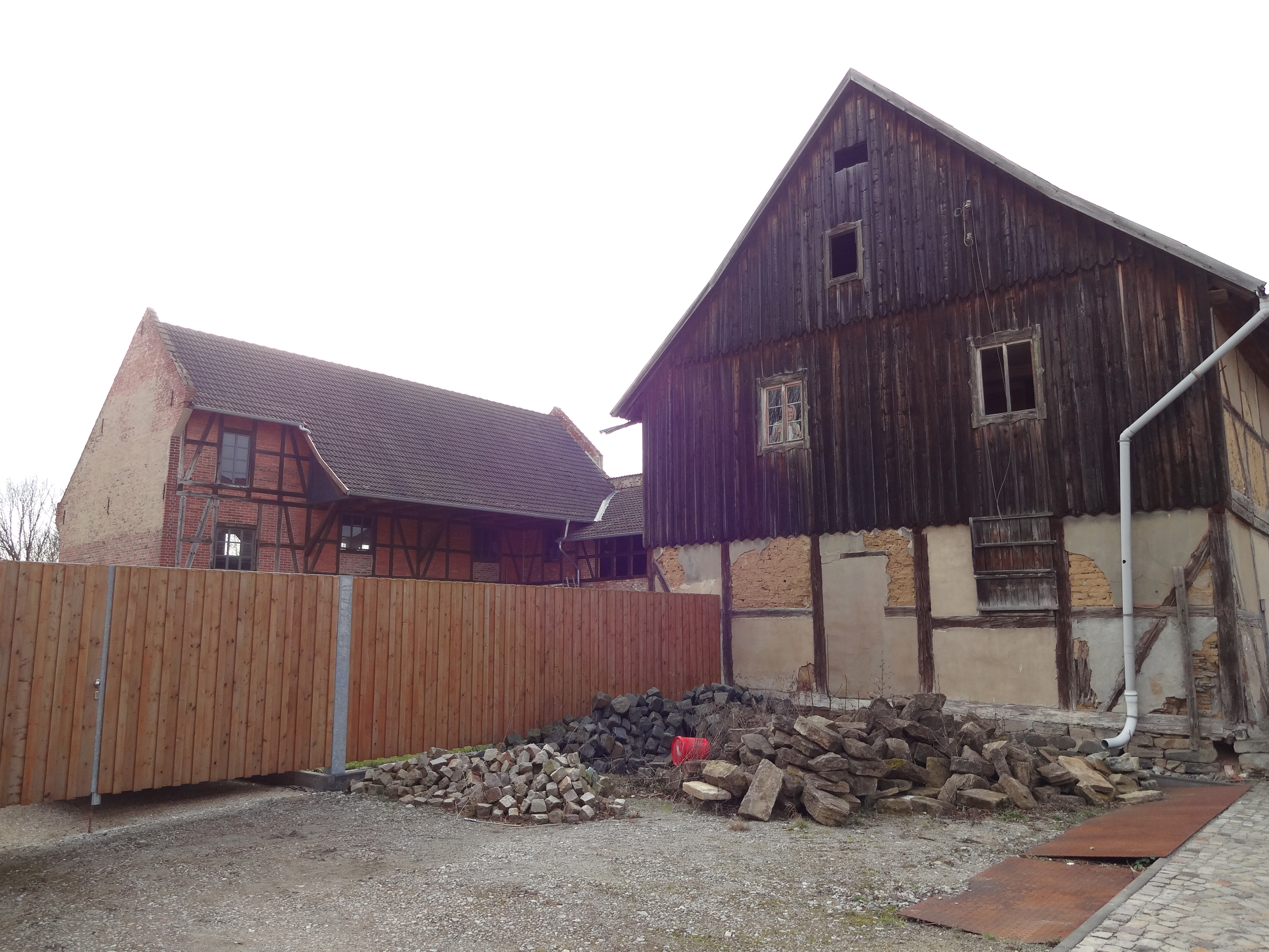 Kulturdenkmal in der Thiestraße 3 in Reddeber; Ortsteil von Wernigerode